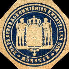 Sealing stamp Title: Königlich Preussische Generalkommission für Westfalen usw. - Münster Description: Briefsiegel, dunkelblau, weiß, geprägt Place: Münster size: 4 cm